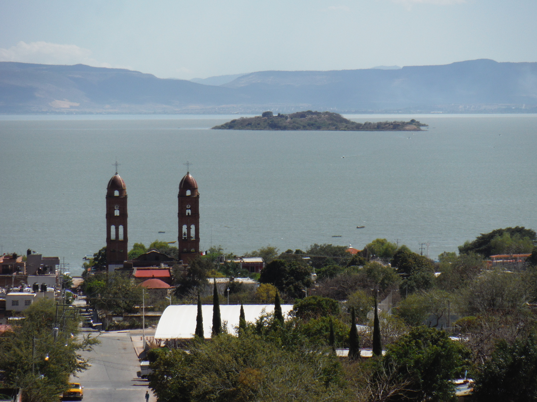 La Isla de Mezcala, ubicada frente al pueblo de Mezcala en el Lago de Chapala.